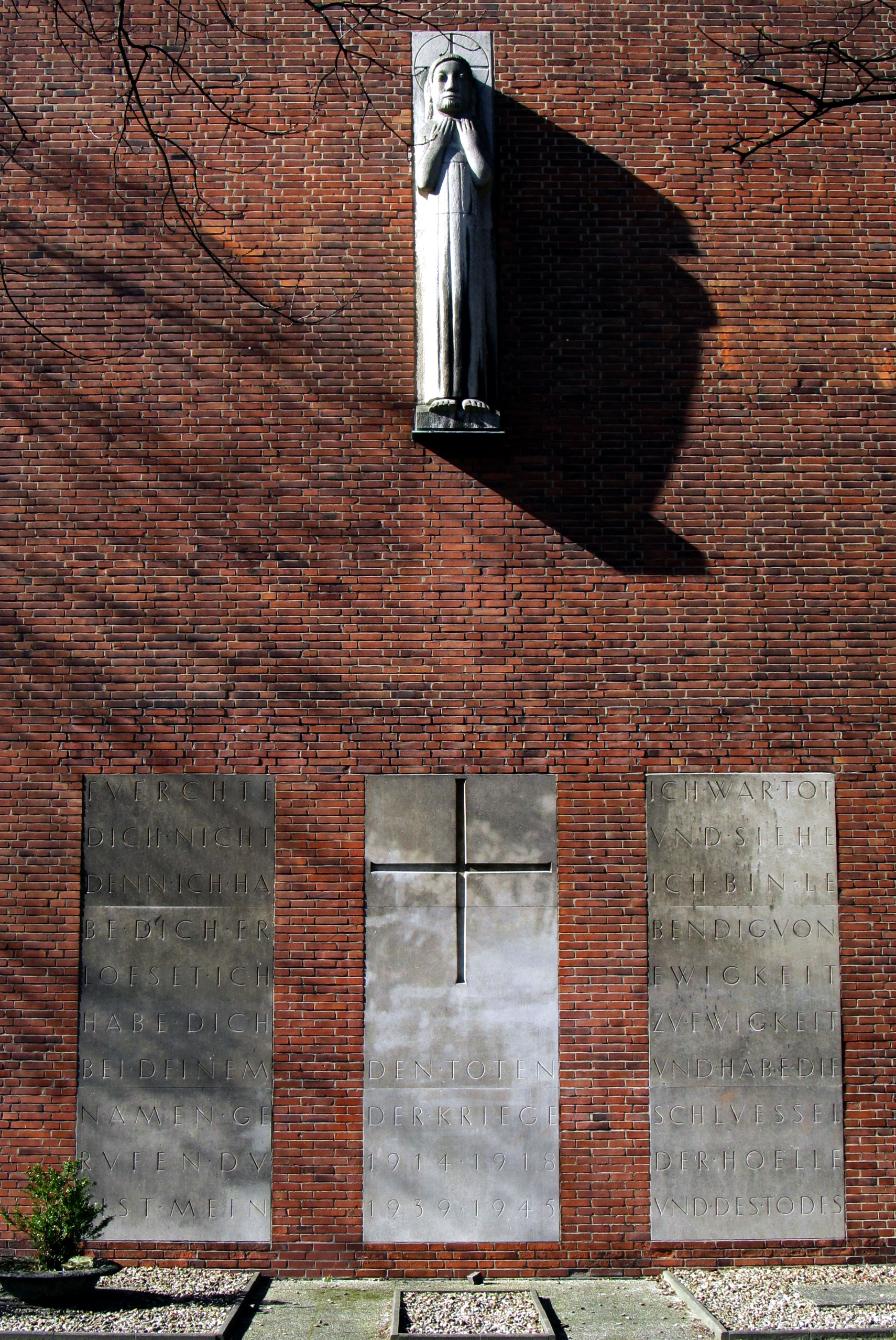 Erlöserkirche Hamburg-Borgfelde, Mahnmal This is a photograph of an architectural monument.